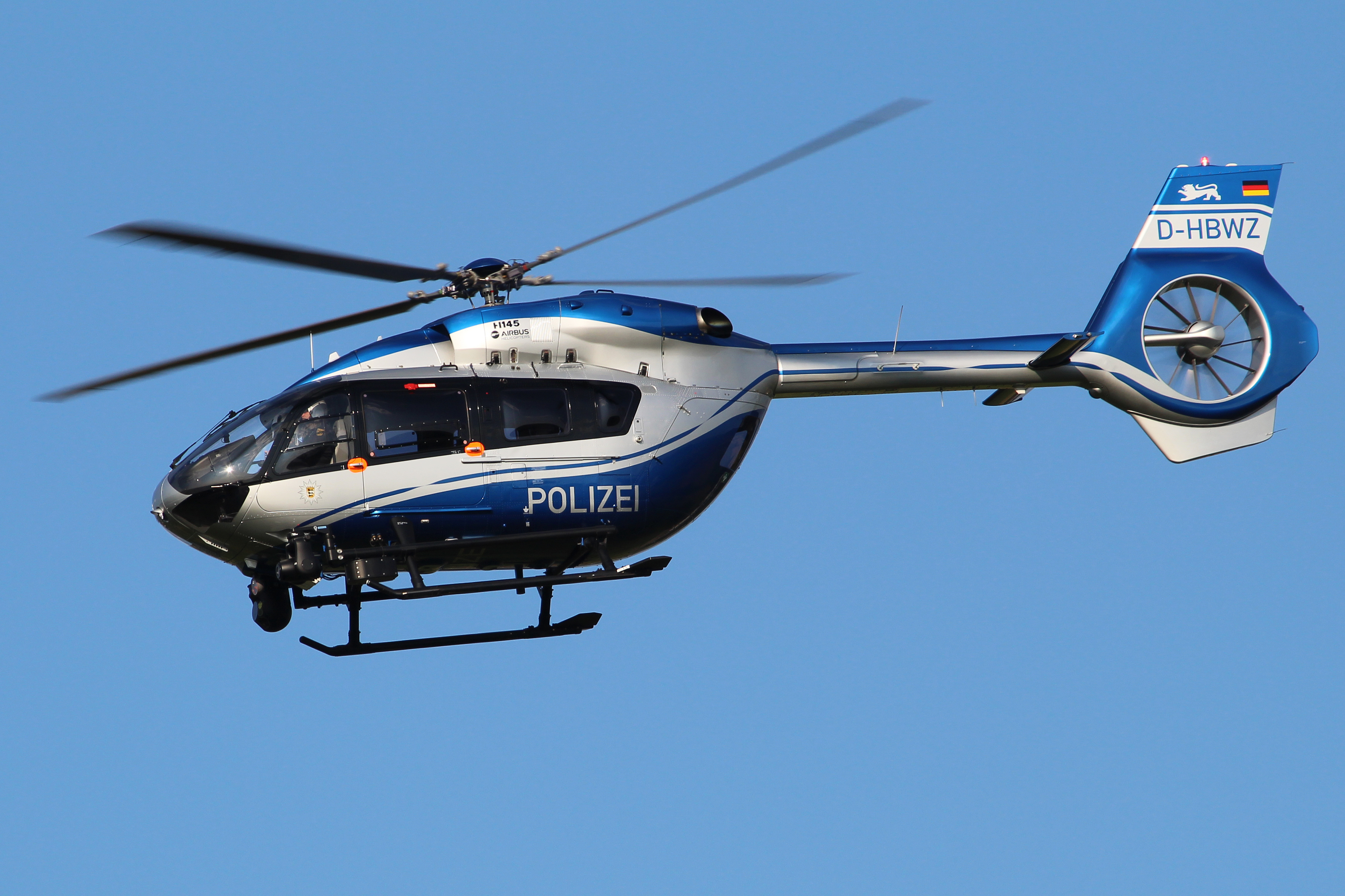 Polizeihubschrauber der Landespolizei Baden-Württemberg